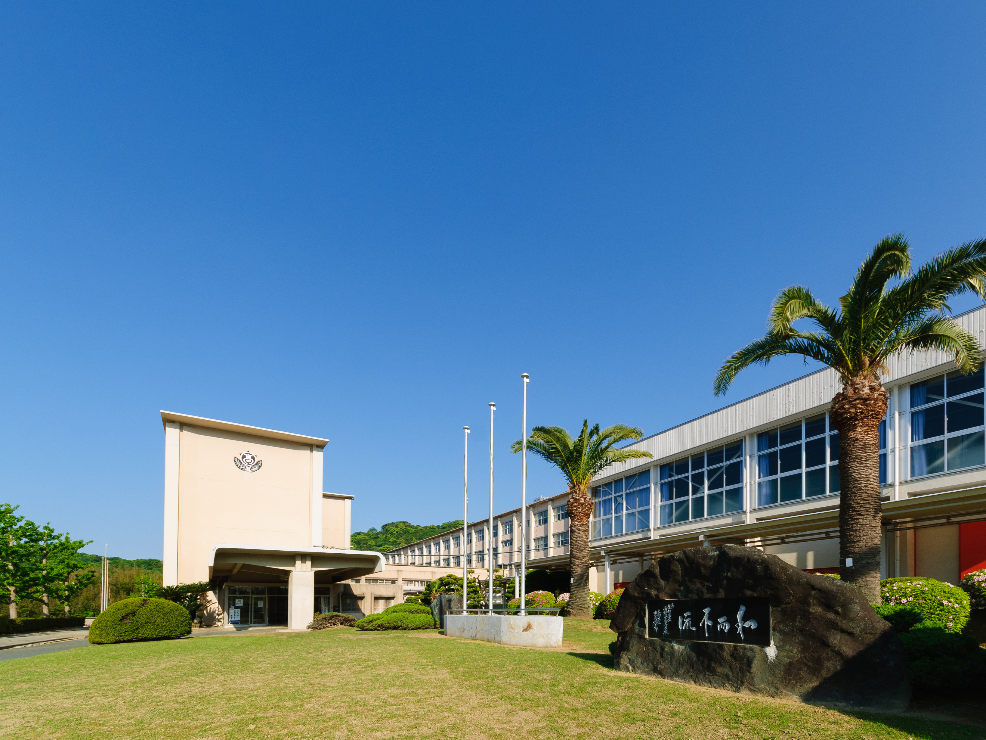 画面右側の建物が体育館，左側の建物が南棟。その間に北棟がみえる。